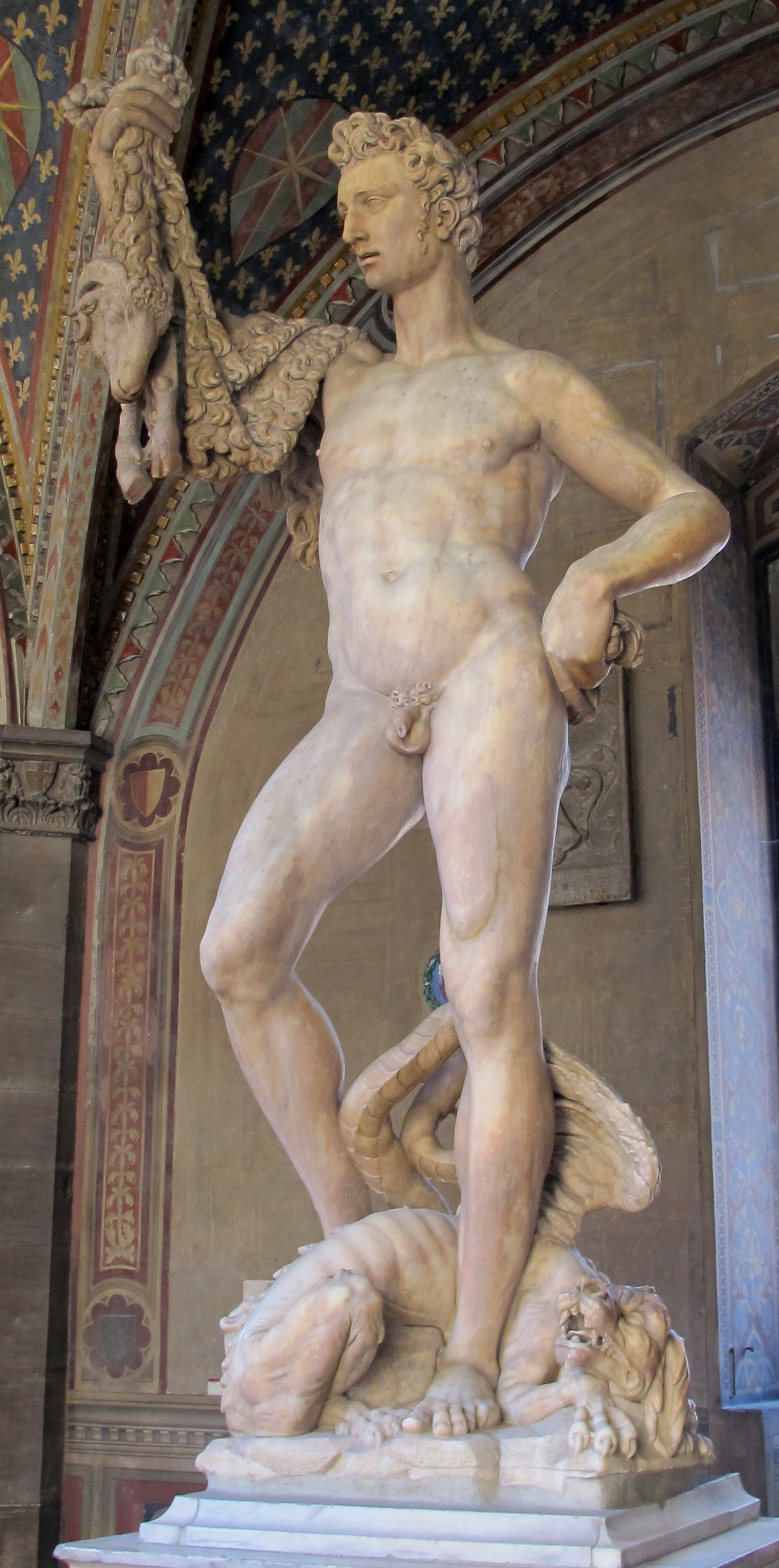 Pietro francavilla, giasone, da palazzo zanchini-corbinelli, 1589